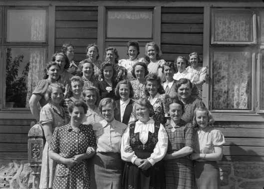 Kurs for arbeiderkvinner på Malmøya, Oslo 1947. Aase Lionæs i første rekke nr. 2 fra venstre.